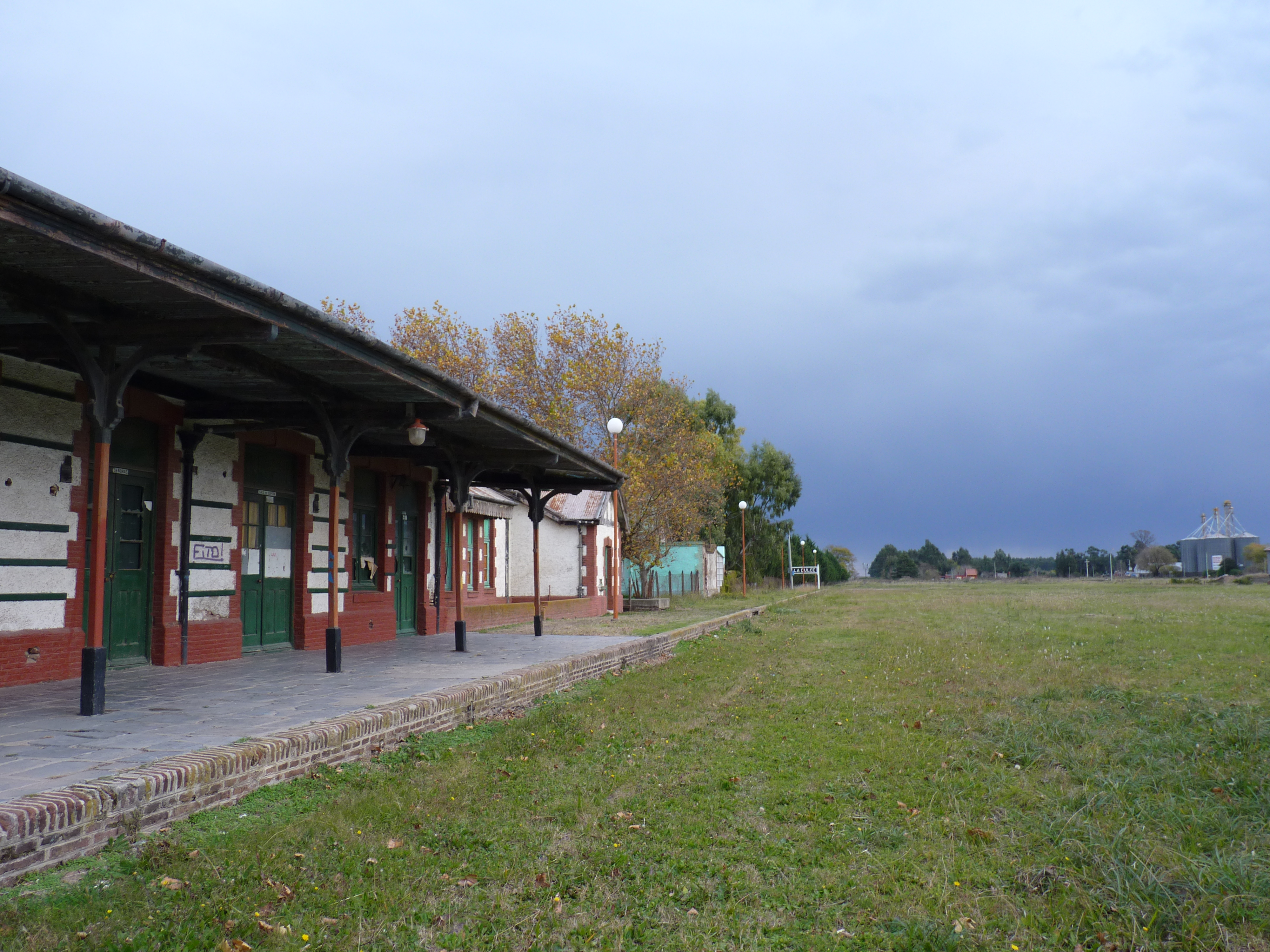 Estación de Trenes de La Dulce Provincia de Buenos Aires Argentina 4ta foto Wiki Tour Argentina 2014